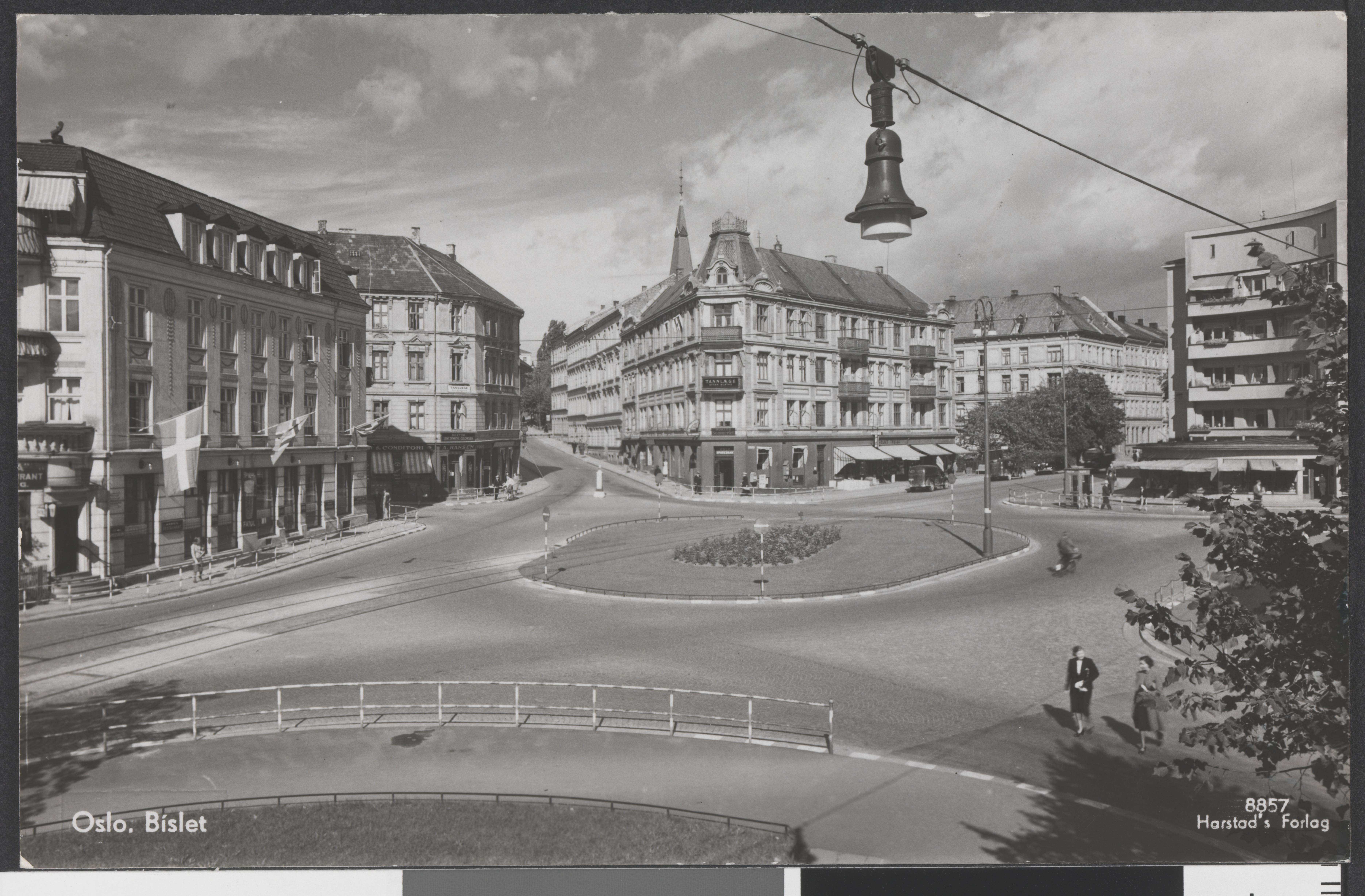 Bildet er hentet fra Nasjonalbibliotekets bildesamling Bislett, Oslo, Oslo